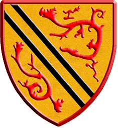 Ce dessin final du blason officiel de la commune de Légny a été réalisé en 2006 par Michel Dhélin qui s'est inspiré du projet réalisé par Jean Mirio en 1992.